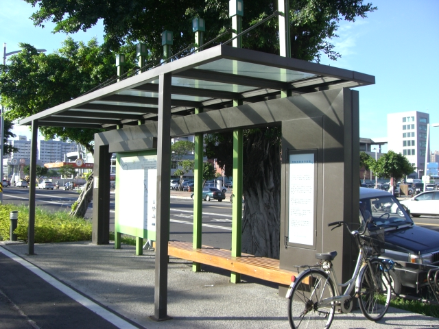 中文（台灣）: 西臨港線自行車道休息亭。